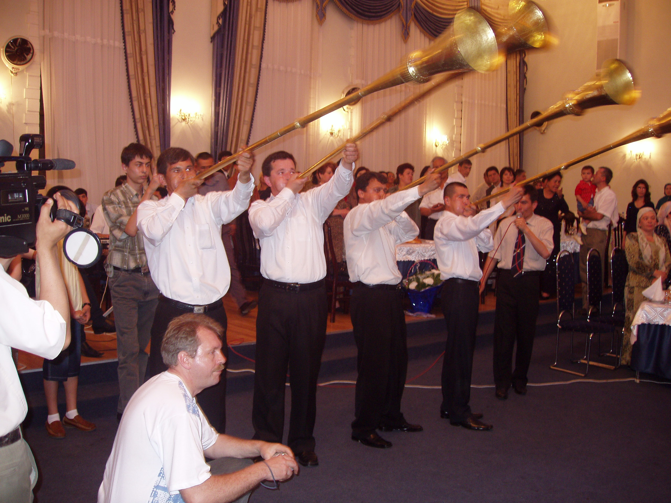 Mariage ouzbek (Personal work, Atilin)